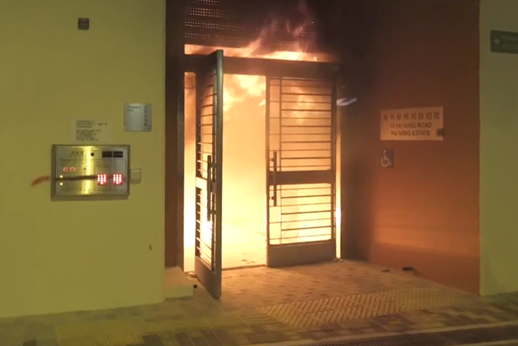 粉嶺暉明邨屋邨大堂遭投擲汽油彈縱火，隨即火光熊熊